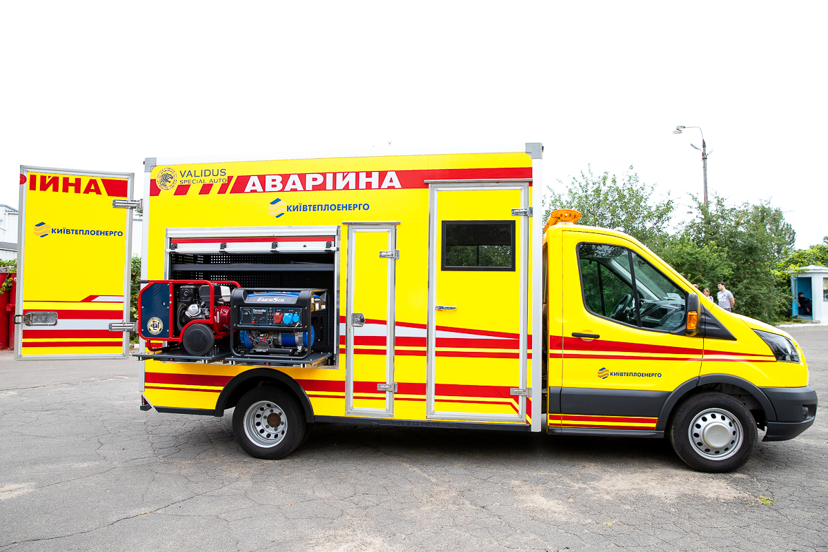 Машина аварійної бригади